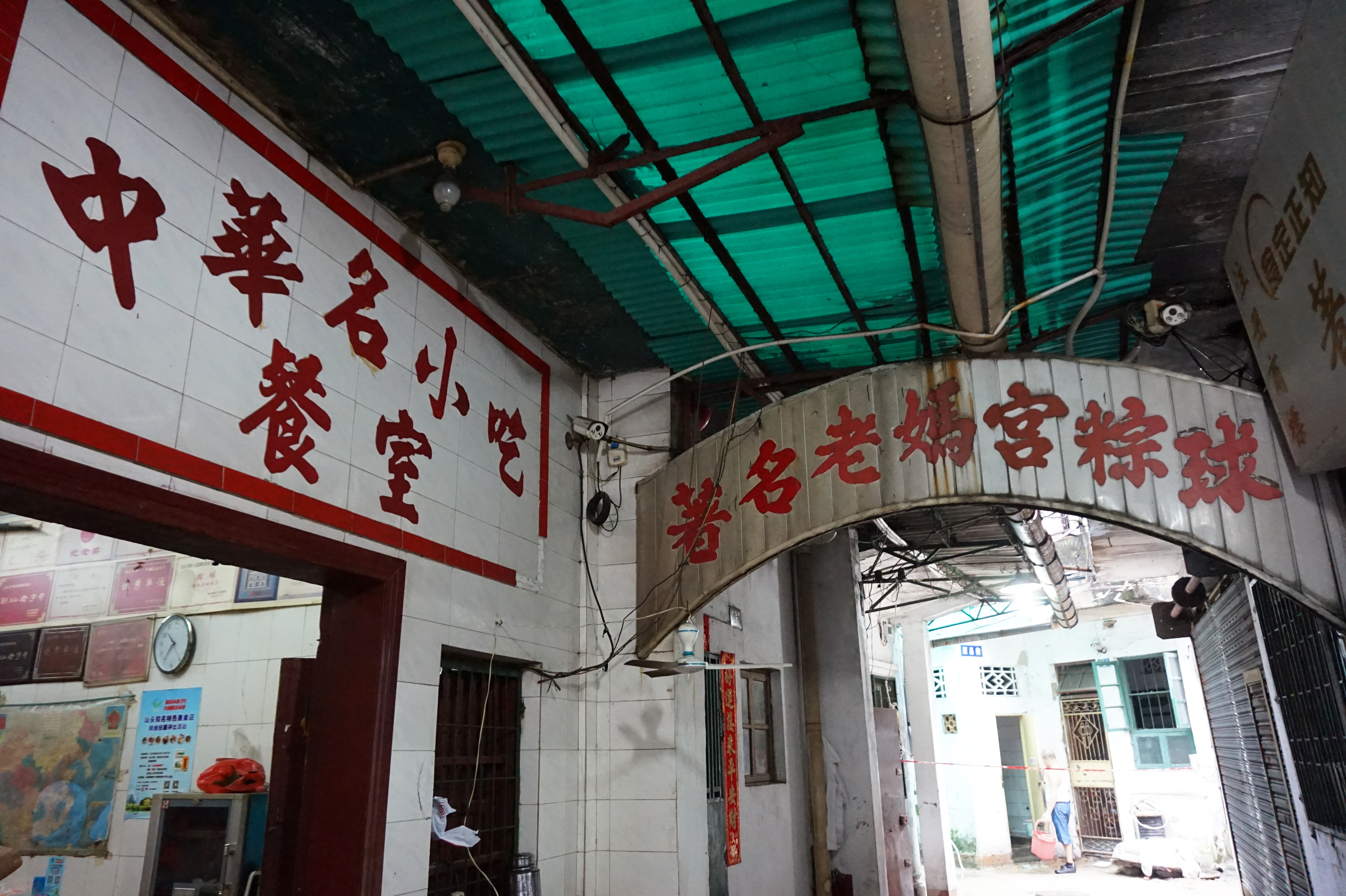 汕头老妈宫粽球。